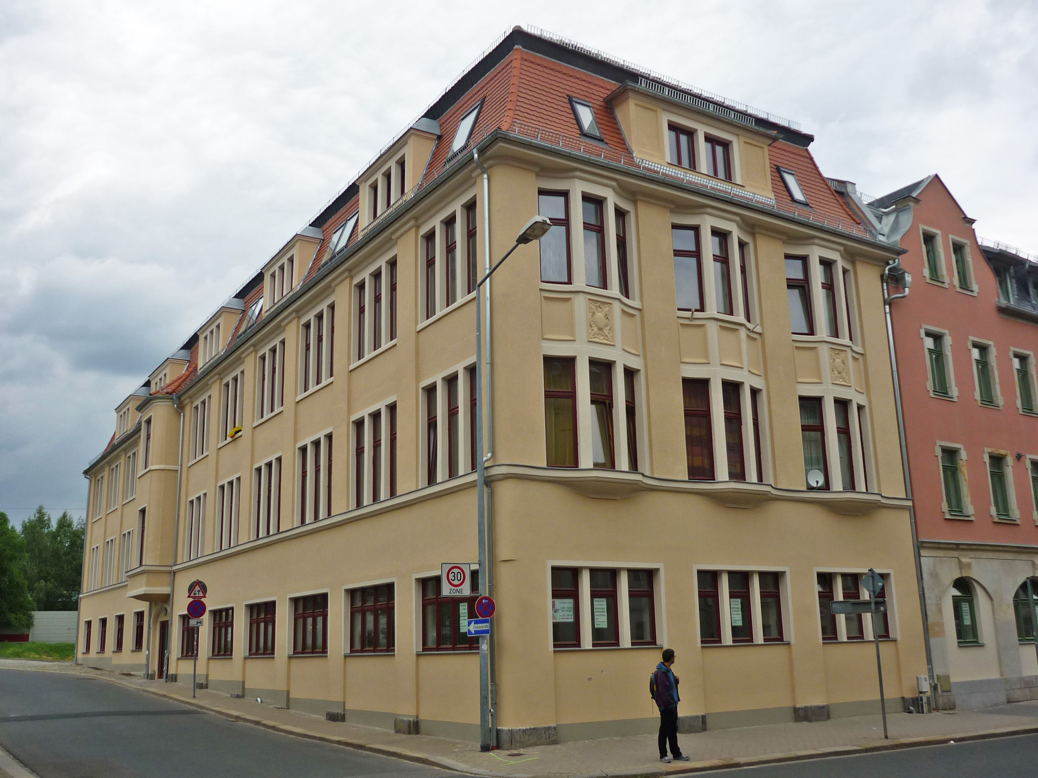 Dresdner Str. 52 in Freital-Potschappel